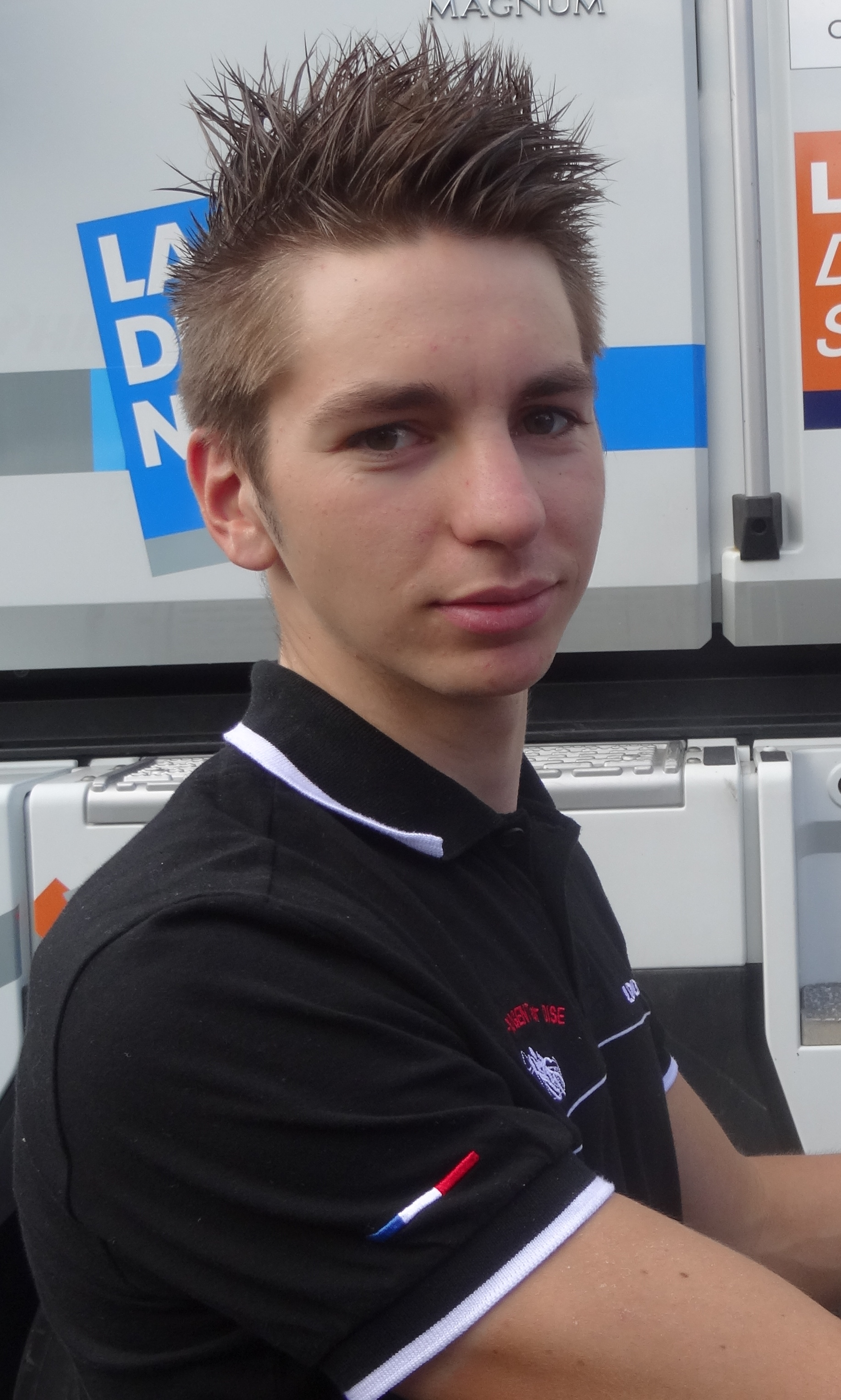 Reportage photographique réalisé le vendredi 23 mai 2014 à l'occasion du départ de la première étape du Paris-Arras Tour 2014 à Lens, Pas-de-Calais, Nord-Pas-de-Calais, France. Depicted person: Anthony Turgis